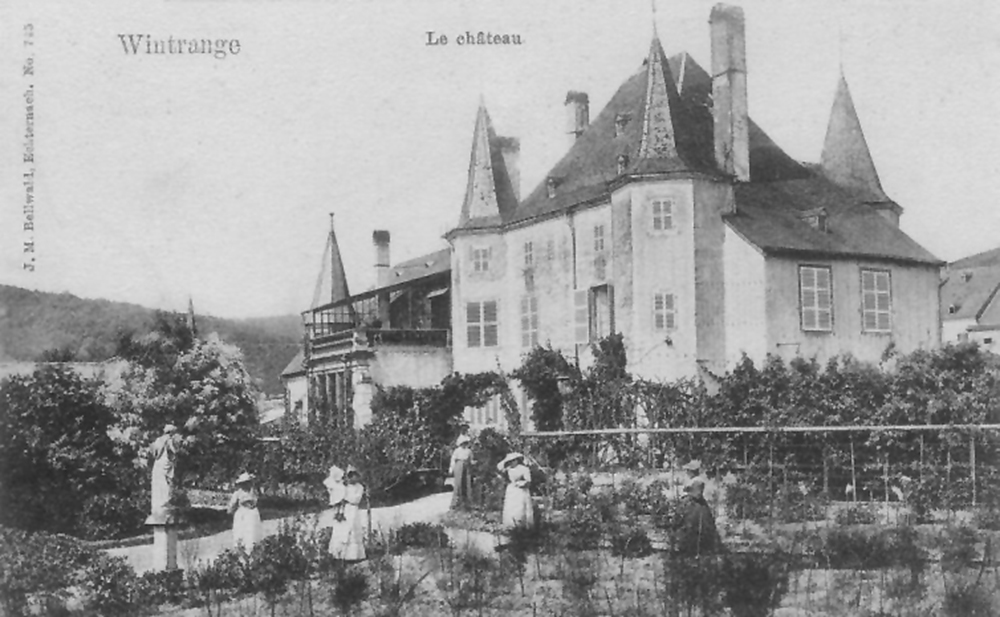 D'Schlass vu Wëntreng. Foto vum J.M. Bellwald, N° 745. (D'Bild ass liicht retouchéiert, vergréissert a geschäerft.)